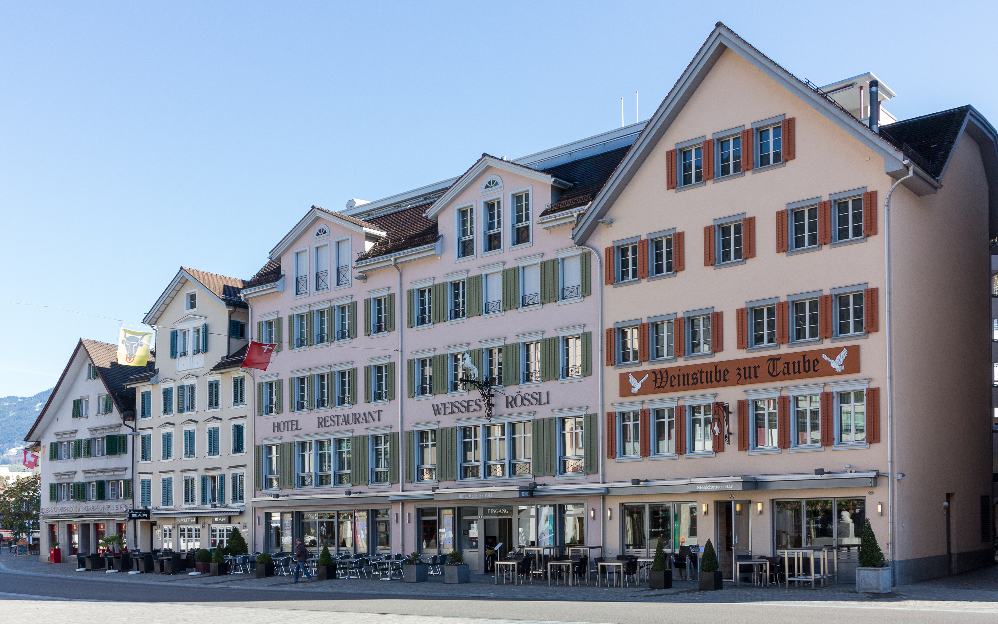 "Schilte Nüni" Gastronomie an der Bahnhofstrasse in Brunnen. Die Häuser wurden nach einem Brand in den Jahren 2006/07 wieder aufgebaut.